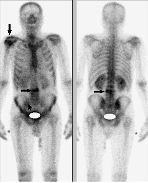 Визуализация метастатических очагов в LIII, проксимальный диафиз правой плечевой кости и в тело правой подвздошной кости через 3 часа после введения 99mTс-золедроновая кислота (Резоскан)